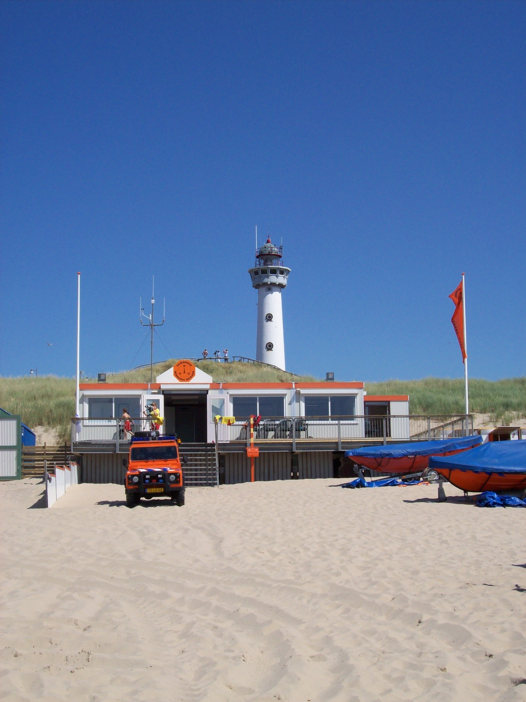 Reddingsbrigade en vuurtoren, Egmond aan Zee (NL)